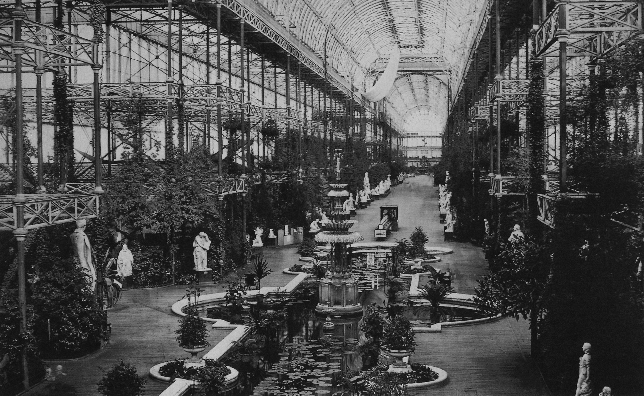 Innenansicht des Kristallpalasts nach der Verlegung des Gebäudes nach Sydenham, Süd-London, im Anschluss an die Ausstellung von 1851.